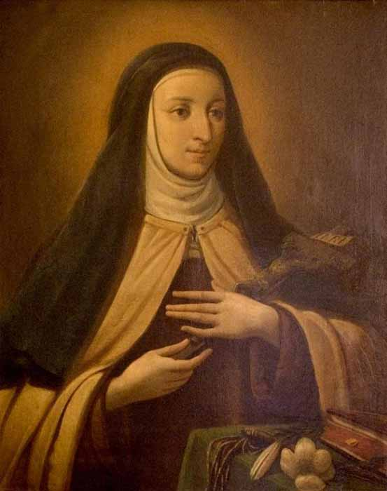 Портрет блаженной Марии Ангелов (в миру Марии Анны Фонтанелла). Автор неизвестен.